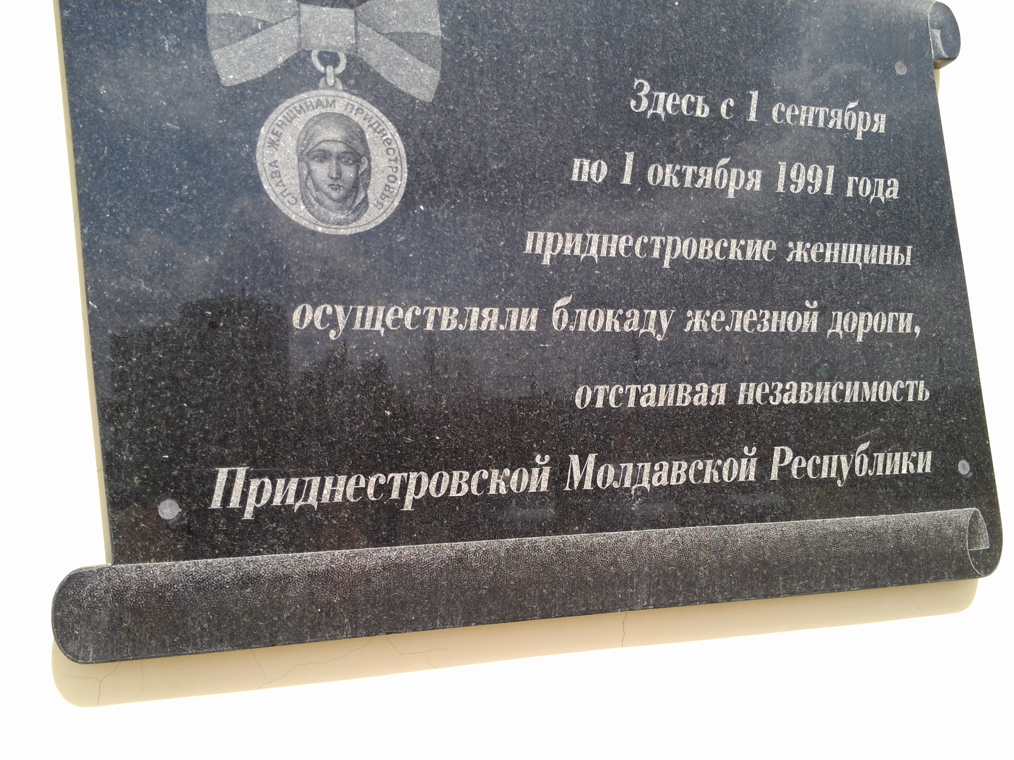 Памятная табличка Женщинам Приднестровья на Ж/д вокзале Тирасполя.